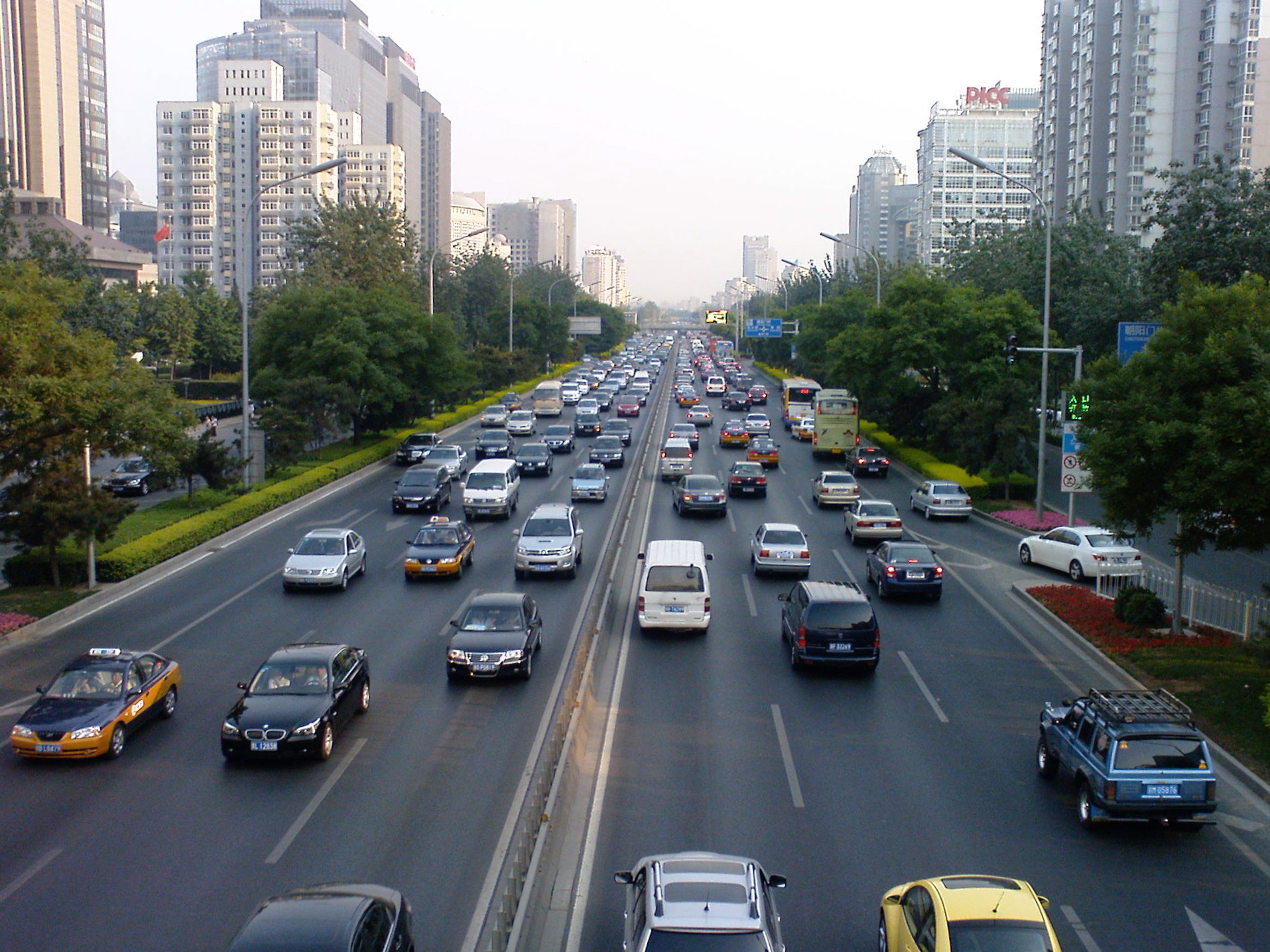 Östra andra ringvägen i Peking söder om Dongsishitio